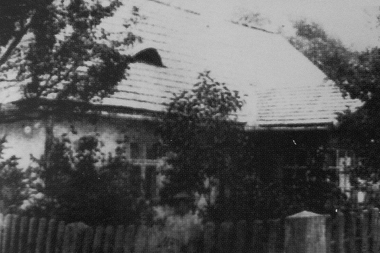 Dom rodziny Vetulanich przy ulicy Ignacego Daszyńskiego w Sanoku.